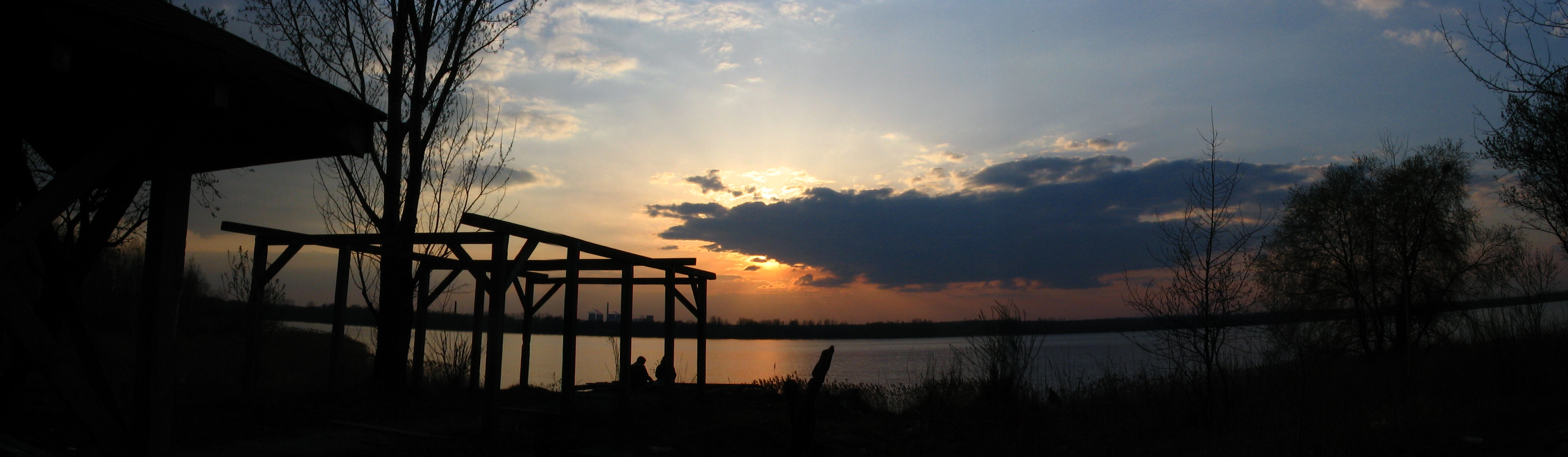 "Jezioro pogoria III w Dąbrowie Górniczej"